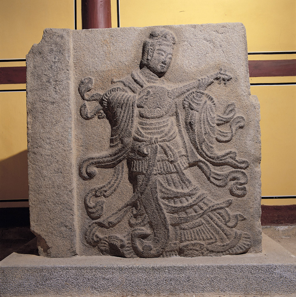 보물 제661호 상주 석조천인상 (尙州 石造天人像) - 천인상 중 비파을 연주하는 주악상